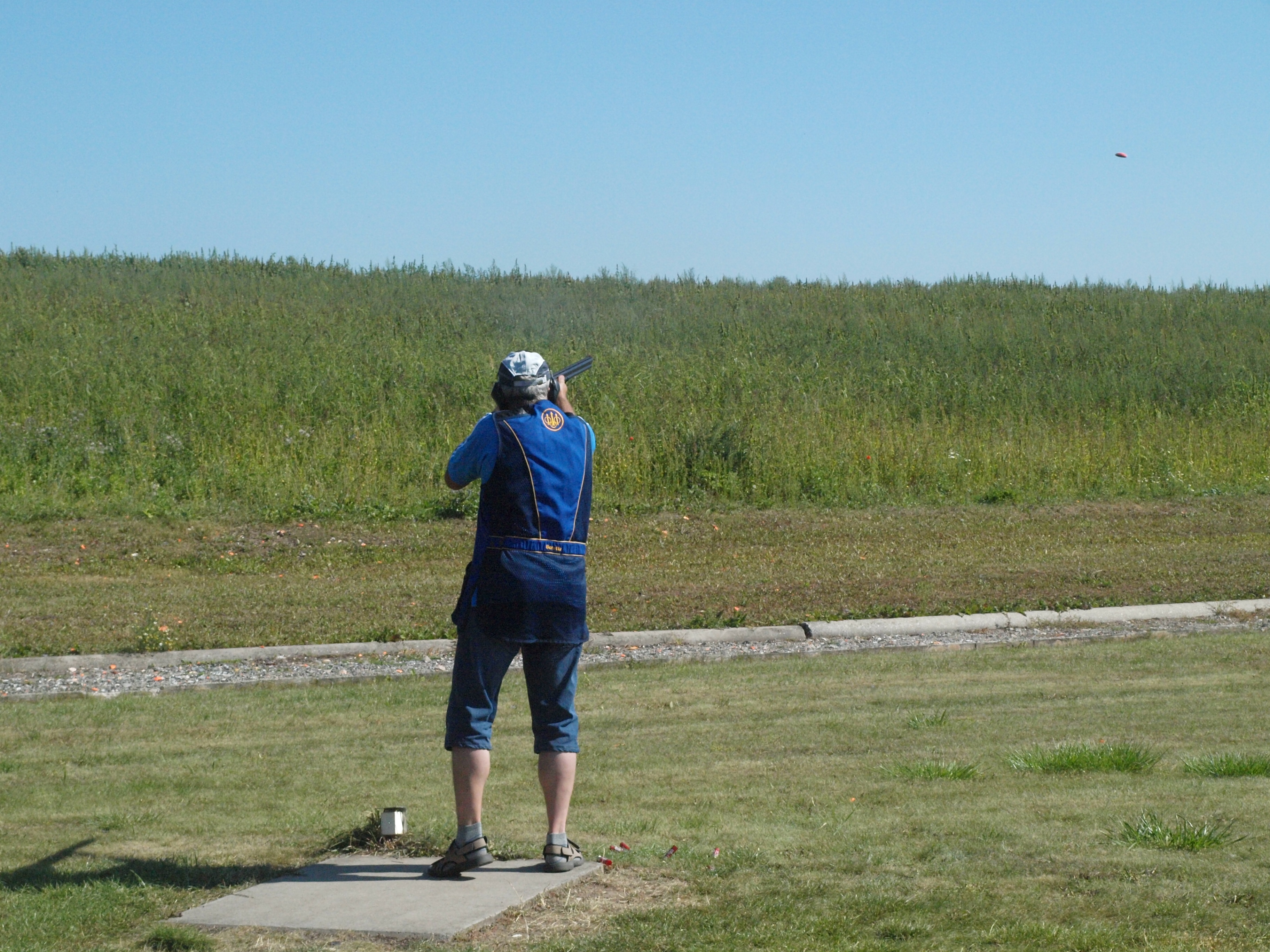 Střelec ve sportovní disciplíně trap (střelbě na pohyblivý terč).